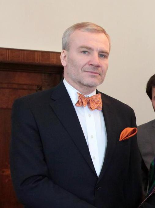 Väino Reinart, Eesti suursaadik Afganistanis